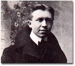 Der junge Vilhjalmur Stefansson